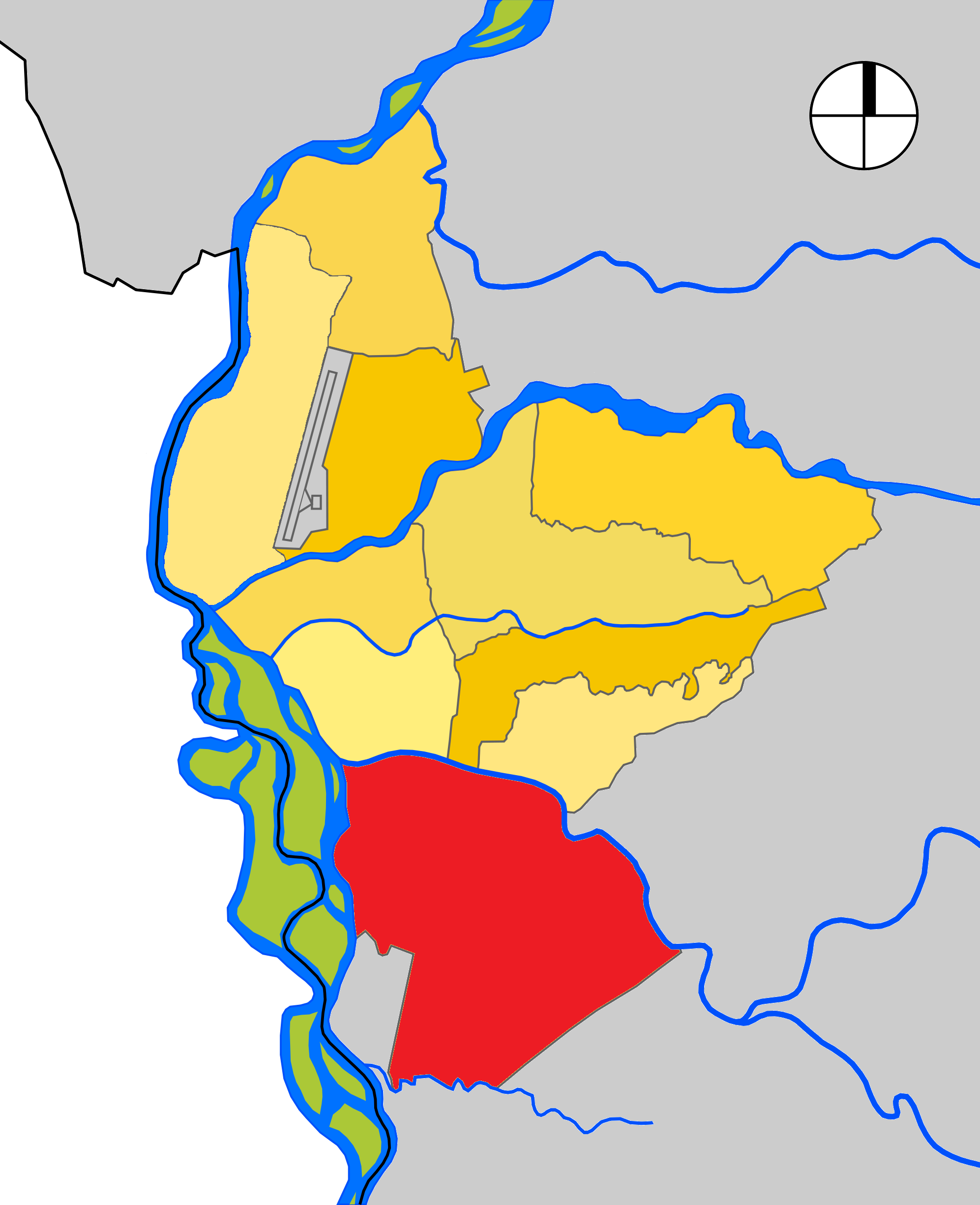 Mapa de las Comuna 6 de Neiva, departamento del Huila, Colombia.